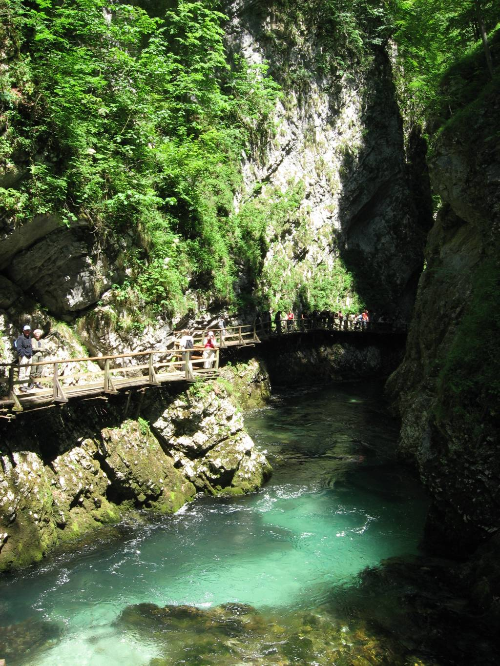 Blejski Vintgar